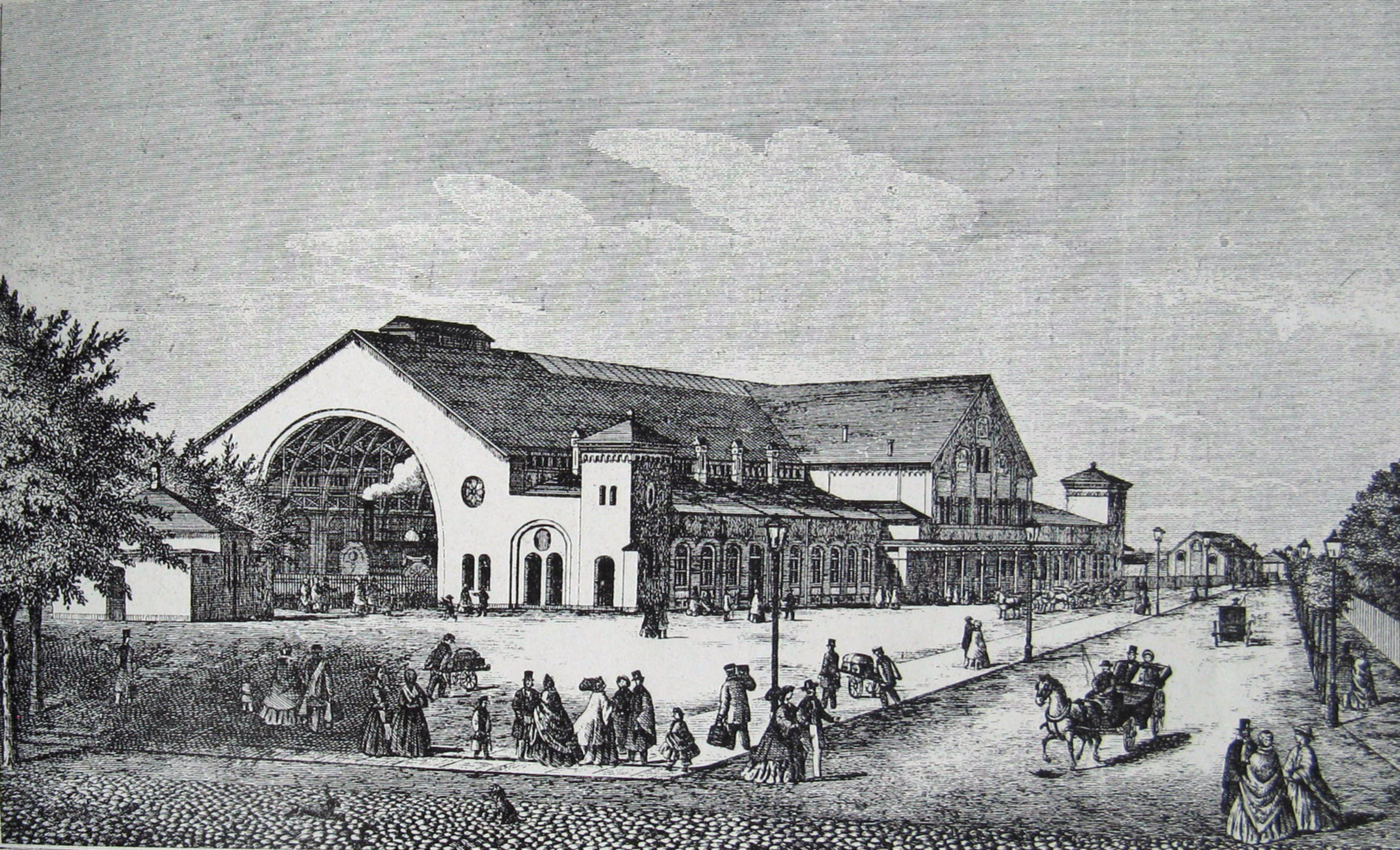 Københavns anden banegård